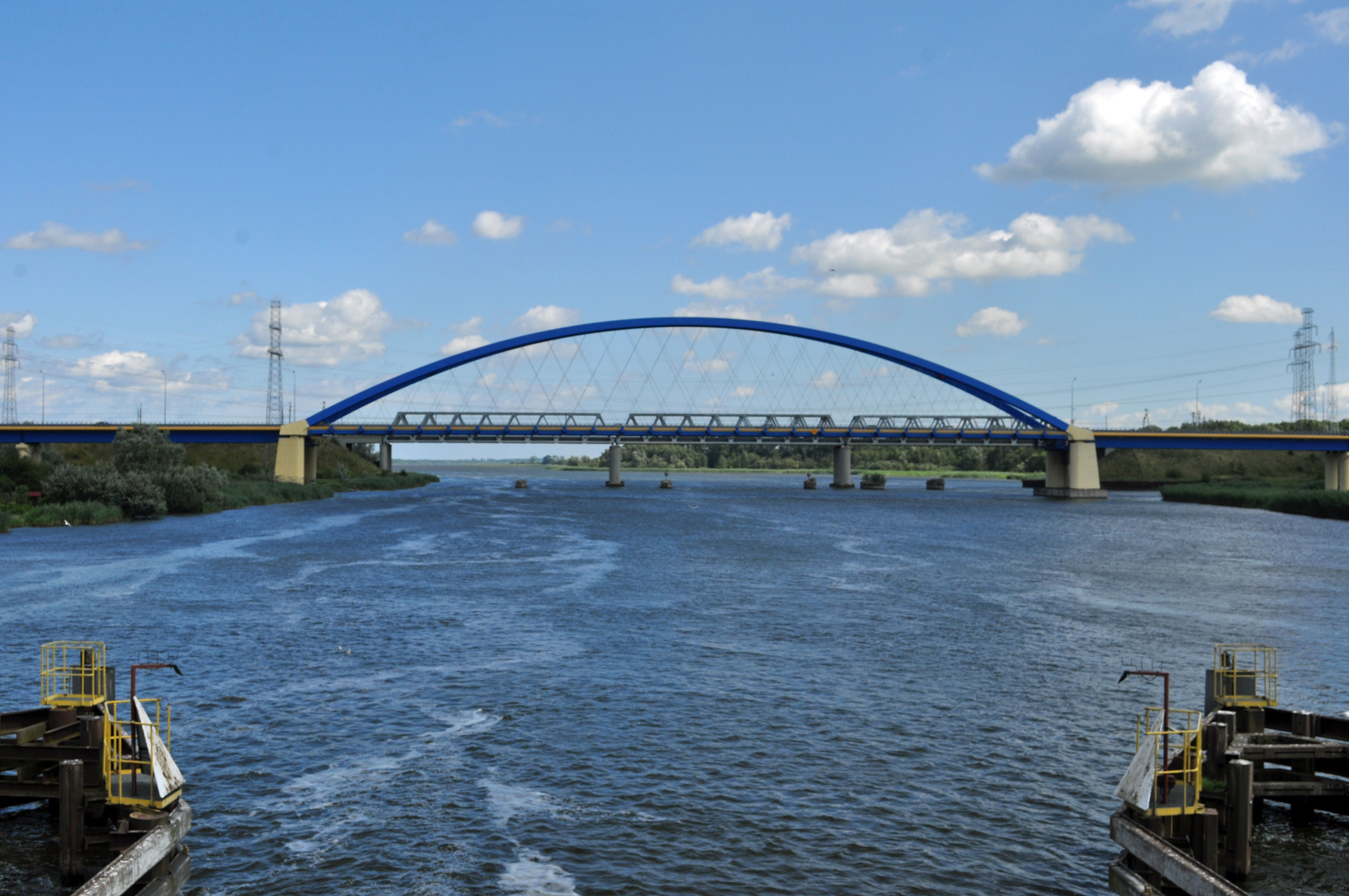 In Wolin (Polen). Aufgenommen am 24. Juli 2011.